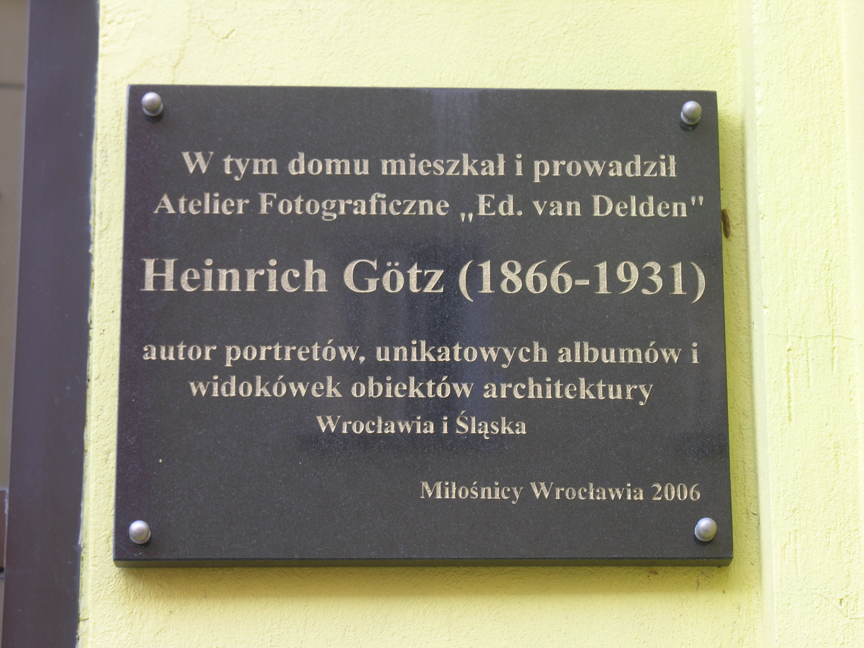 Tablica ku czci fotografa Heinricha Götza, Wrocław, róg ul. Kościuszki i Placu Muzealnego